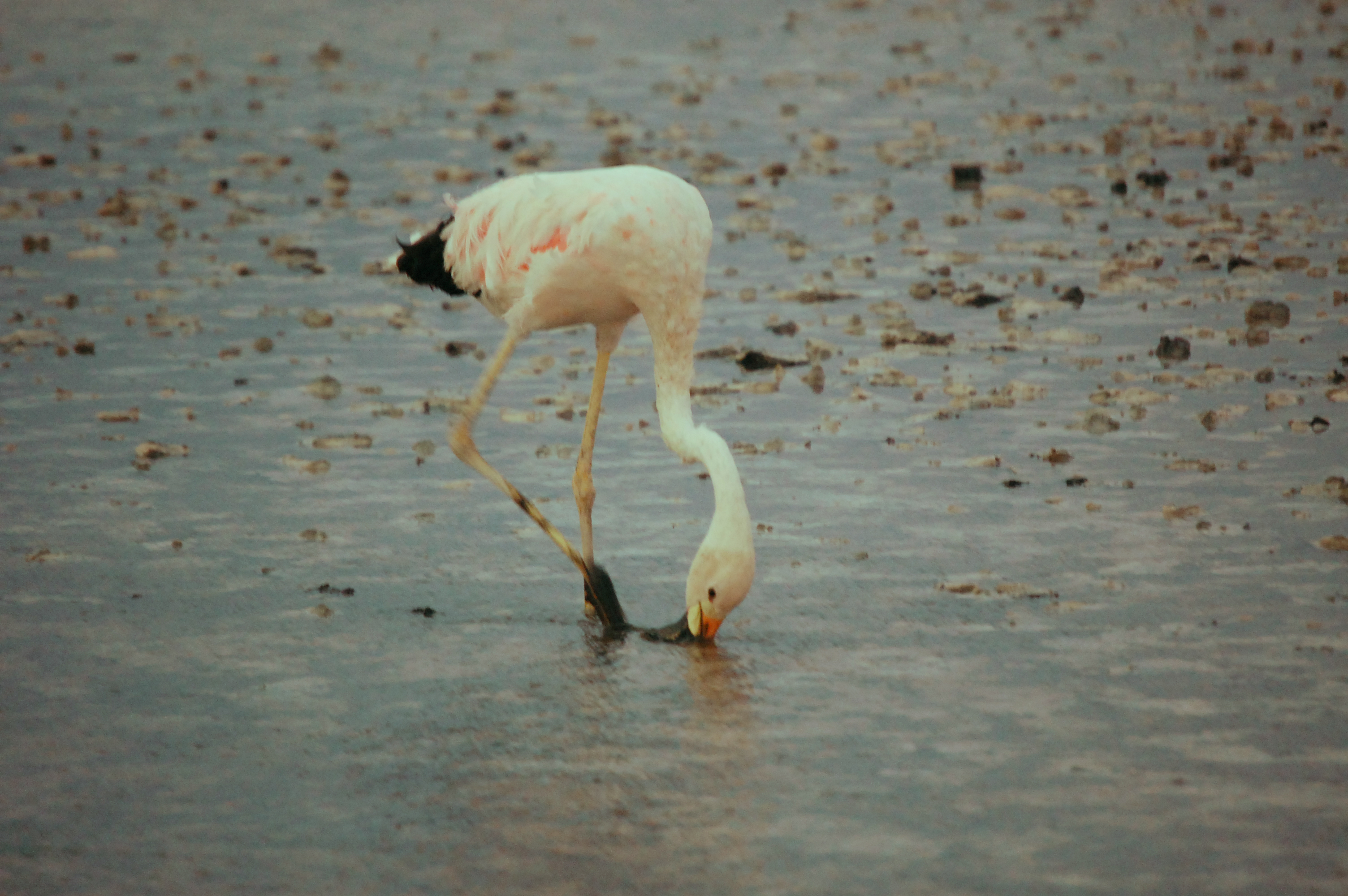 Phoenicoparrus andinus en Soncor. San Pedro de Atacama, Chile, 2011.